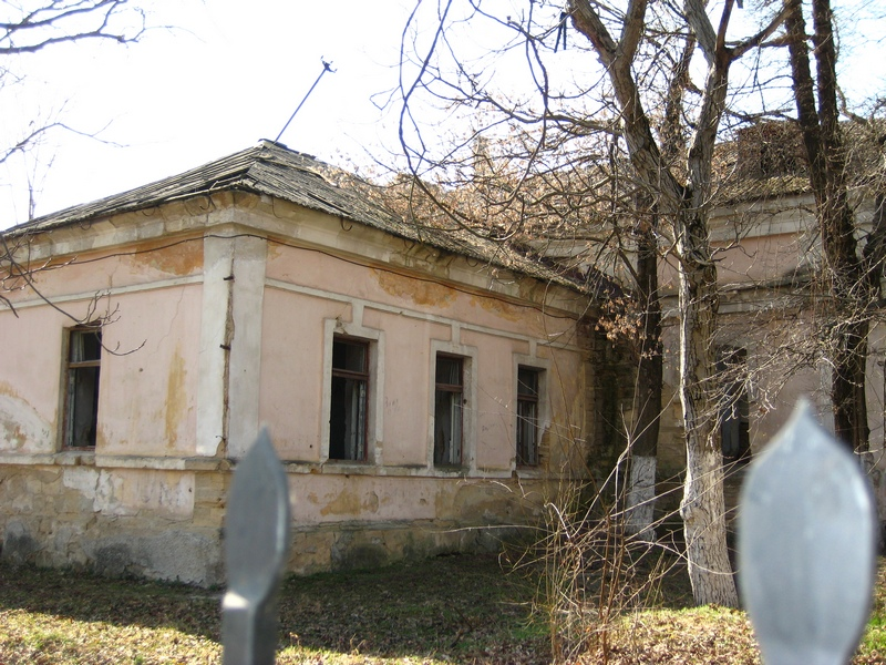 Здание бывшей Аудитории (вид сбоку)